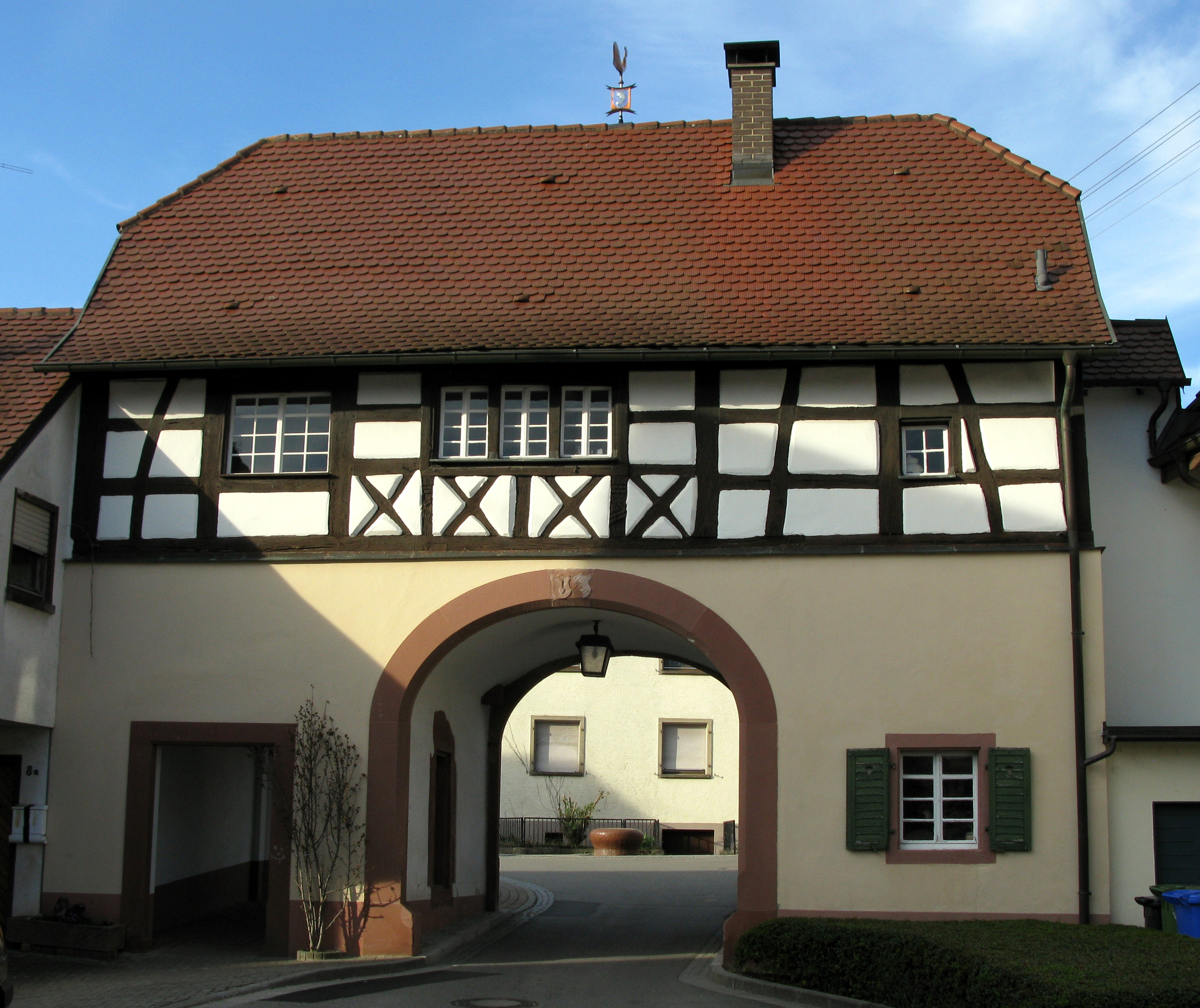 Das Torhäusle in Malterdingen von innen